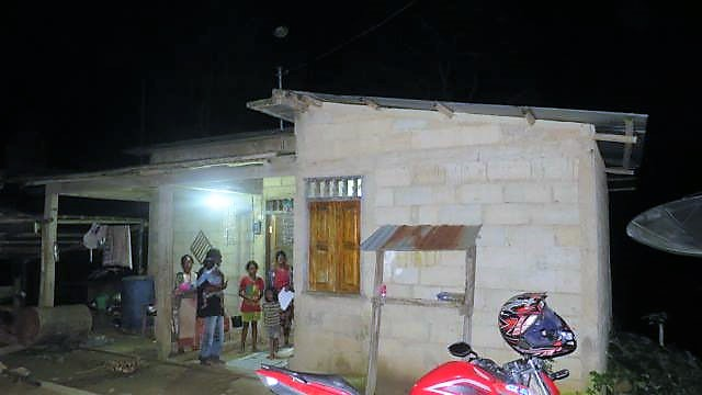 Hütte in Lacao, Atsabe, Ermera, Osttimor